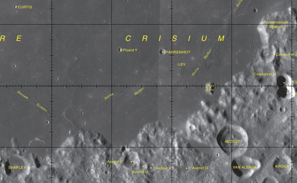 Cráter lunar Fahrenheit. Localización. (Imagen LRO)